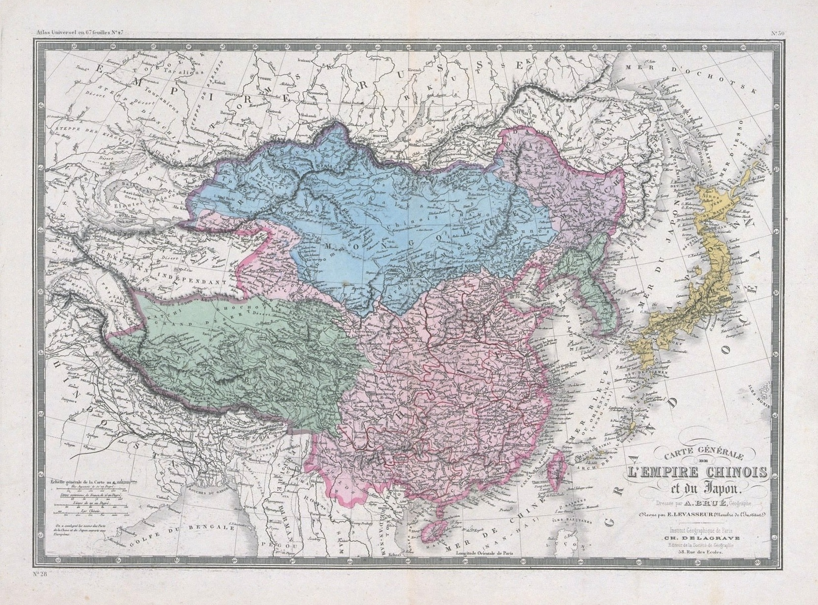 Carte Générale de L'Empire Chinois et du Japon. Dresses par A. Brué, Geographe. Revue par E. Levasseur.